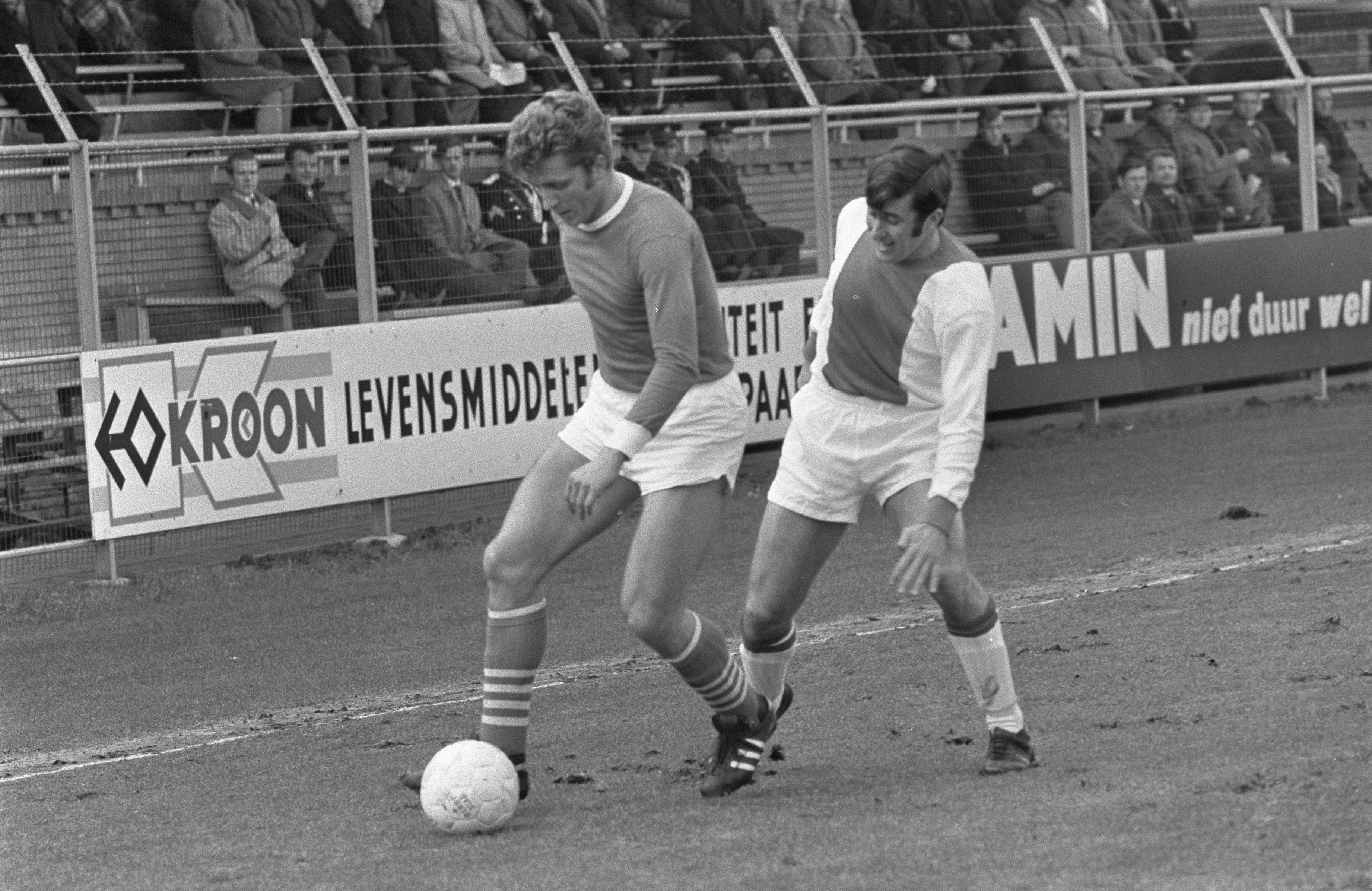 Collectie / Archief : Fotocollectie Anefo Reportage / Serie : [ onbekend ] Beschrijving : Ajax tegen Schalke 04 (vriendschappelijke wedstrijd) Swart (rechts) in aktie Datum : 23 maart 1969 Trefwoorden : sport, voetbal Fotograaf : Mieremet, Rob / Anefo Auteursrechthebbende : Nationaal Archief Materiaalsoort : Negatief (zwart/wit) Nummer archiefinventaris : bekijk toegang 2.24.01.05 Bestanddeelnummer : 922-2246